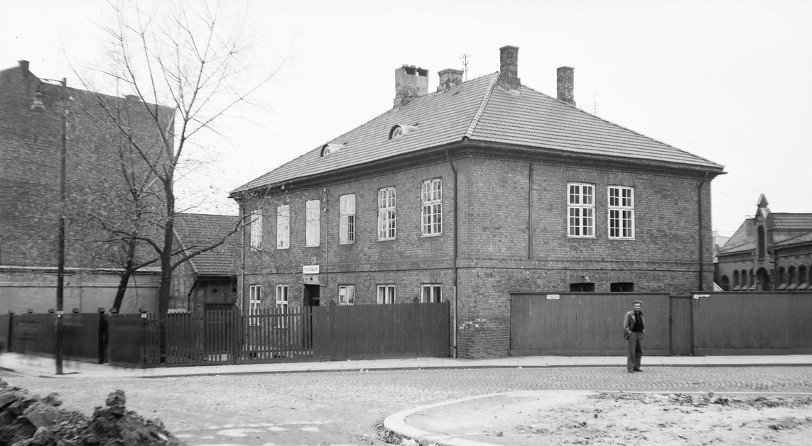 Pipervika politistasjon i Skolegaten 8 Foto: Fritz Holland/Oslo Museum, 1937